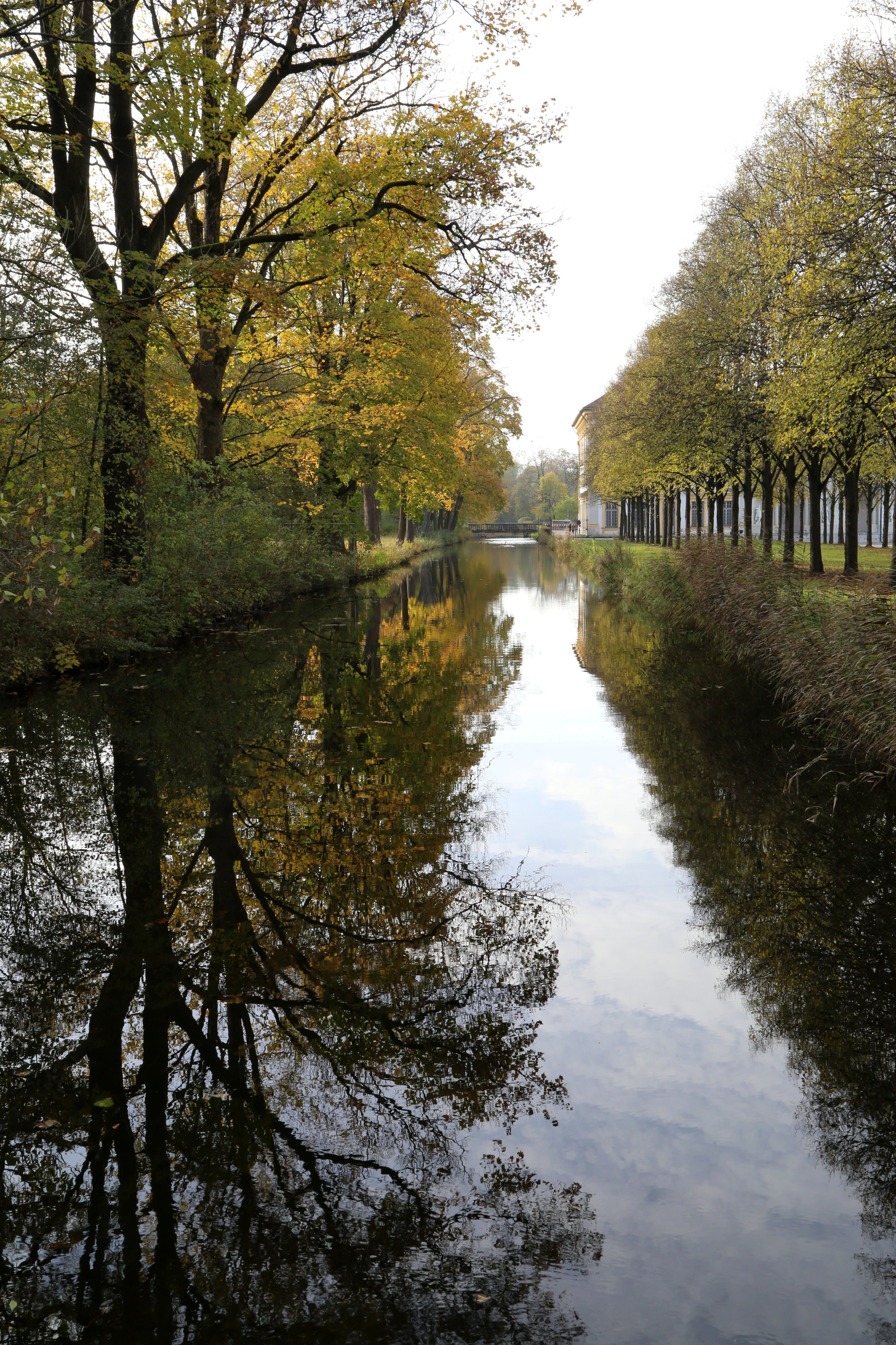 Schlossanlage Schleißheim, Hofgarten, Südlicher Seitenkanal